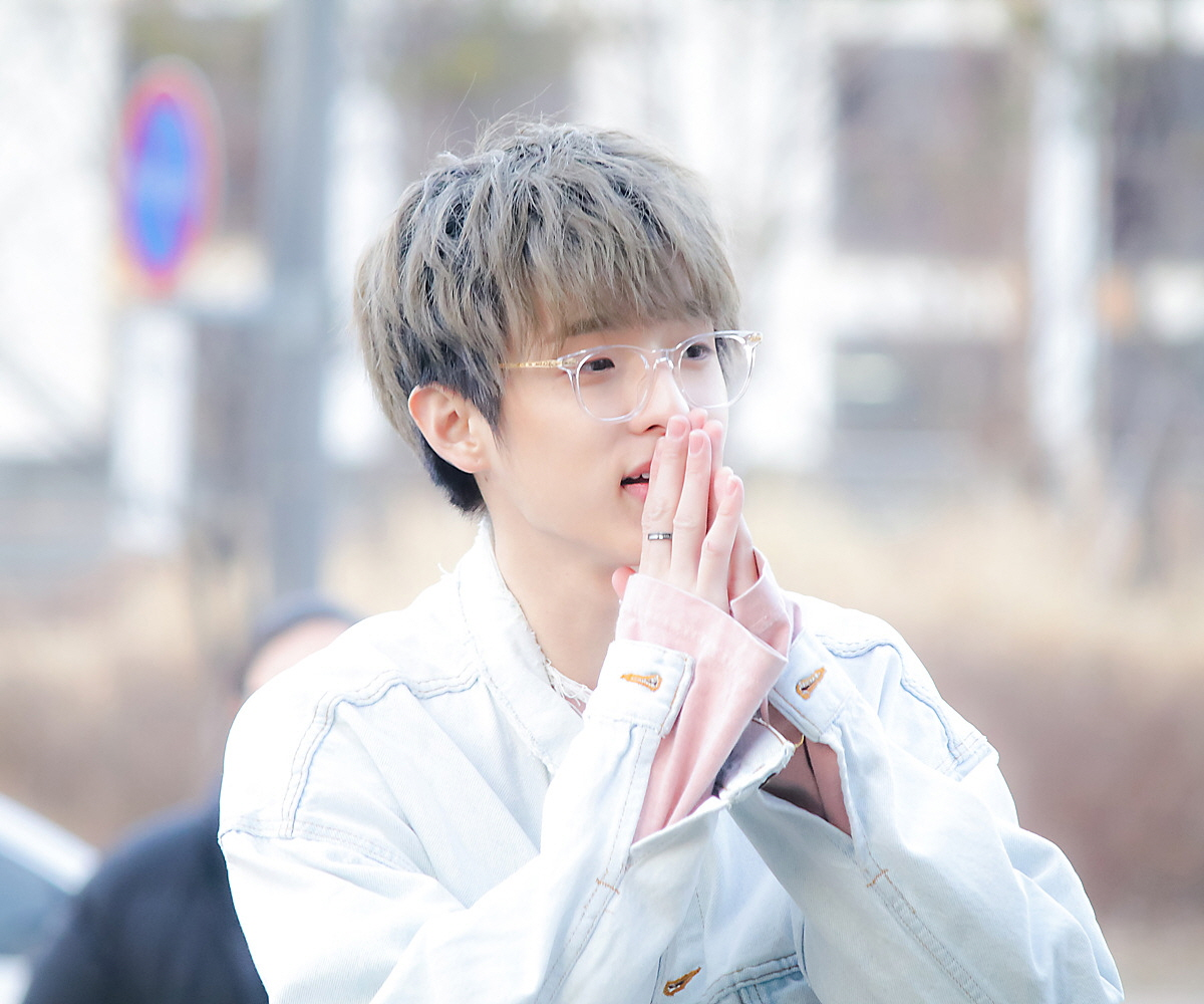 170311 DAY6 음악중심 미니팬미팅 by SinC